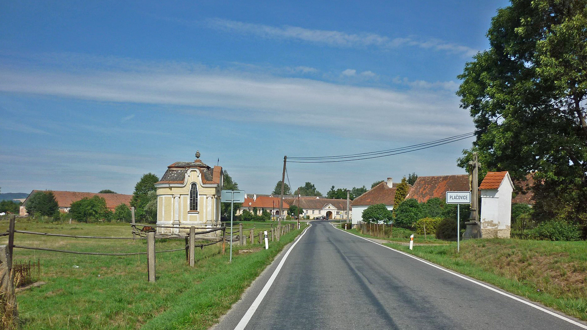 Plačovice - malá vesnice, místní část obce Dešná